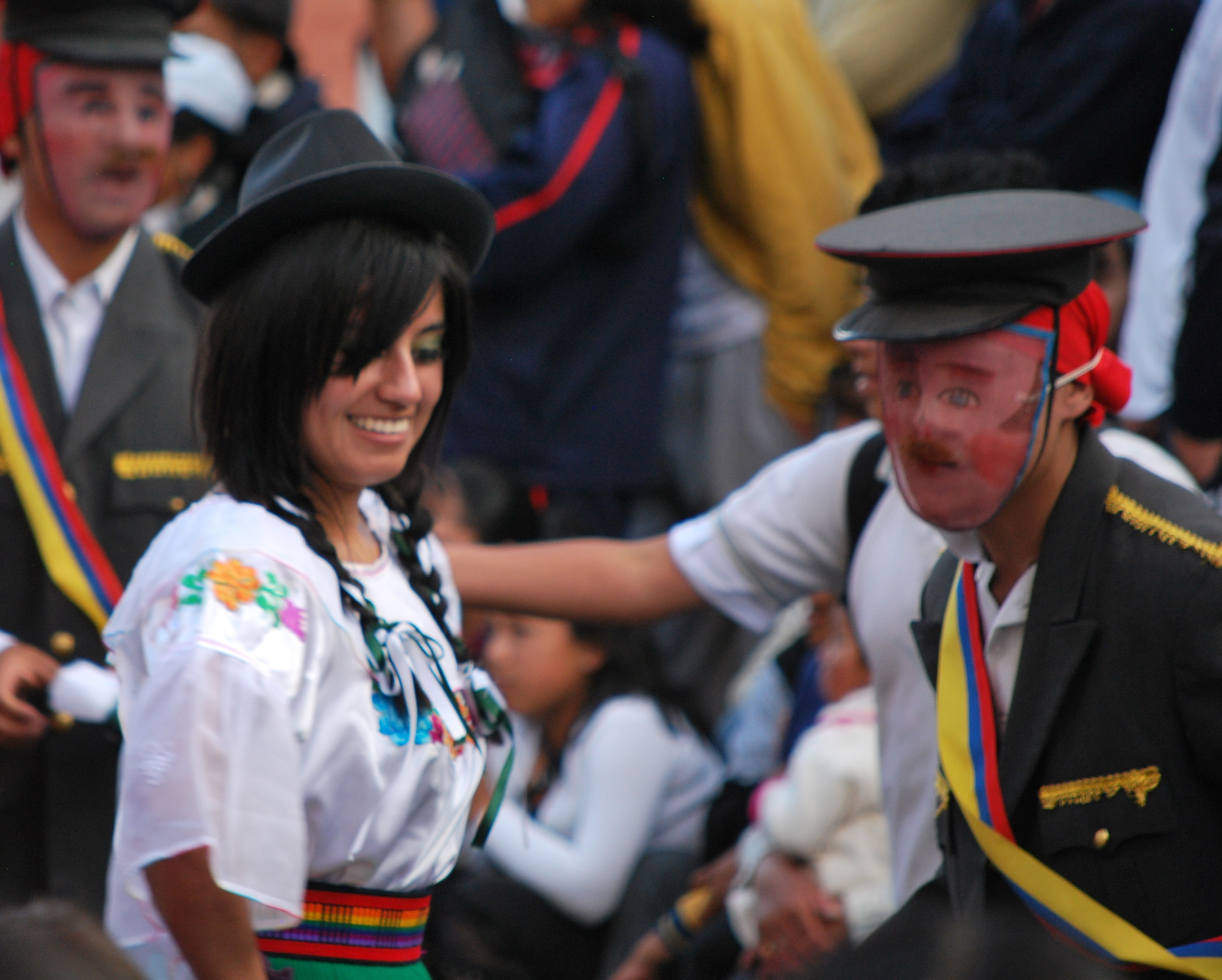 Baile típico del Ecuador